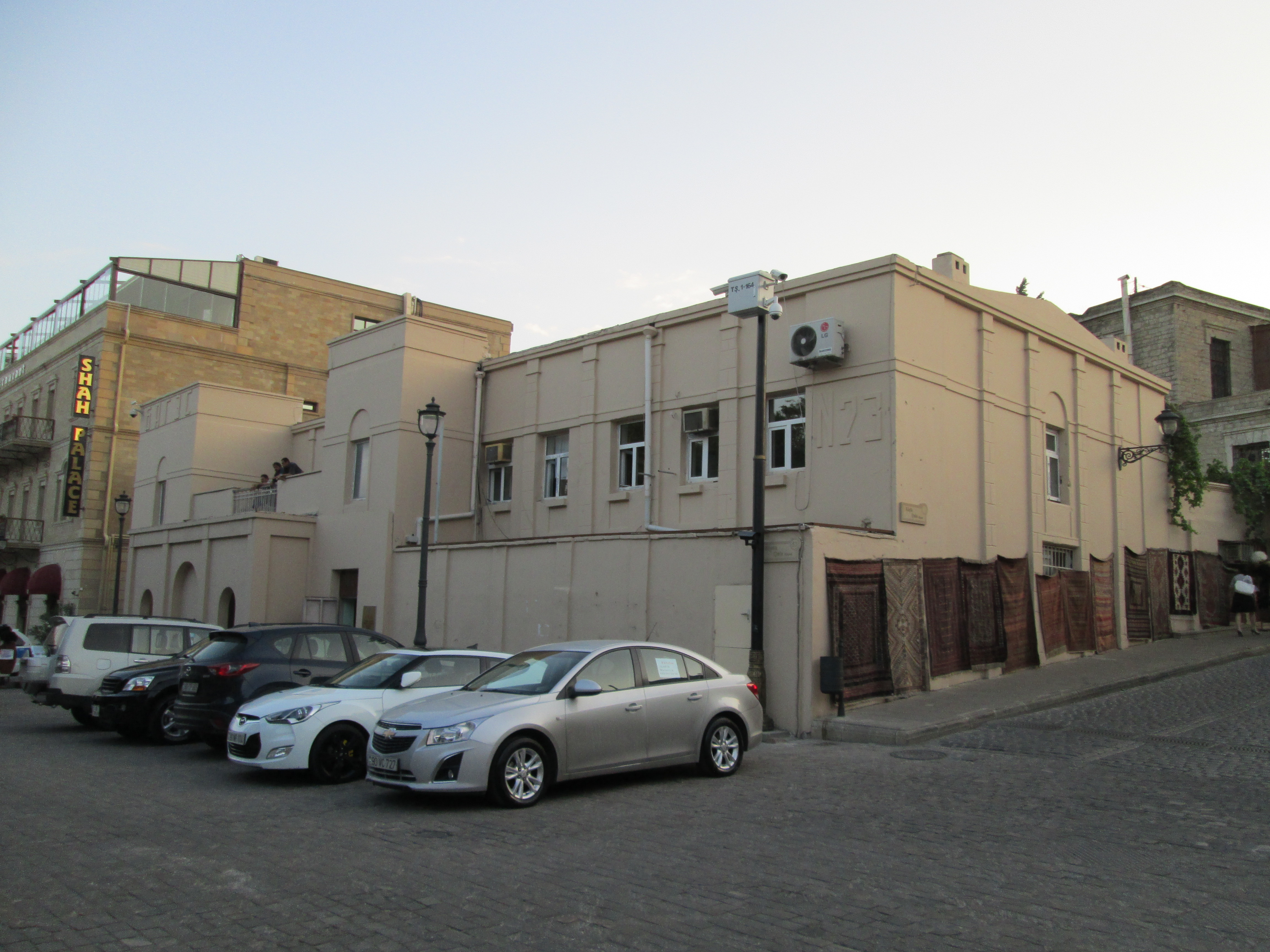 Müqəddəs Nikolay kilsəsinin qalıqları